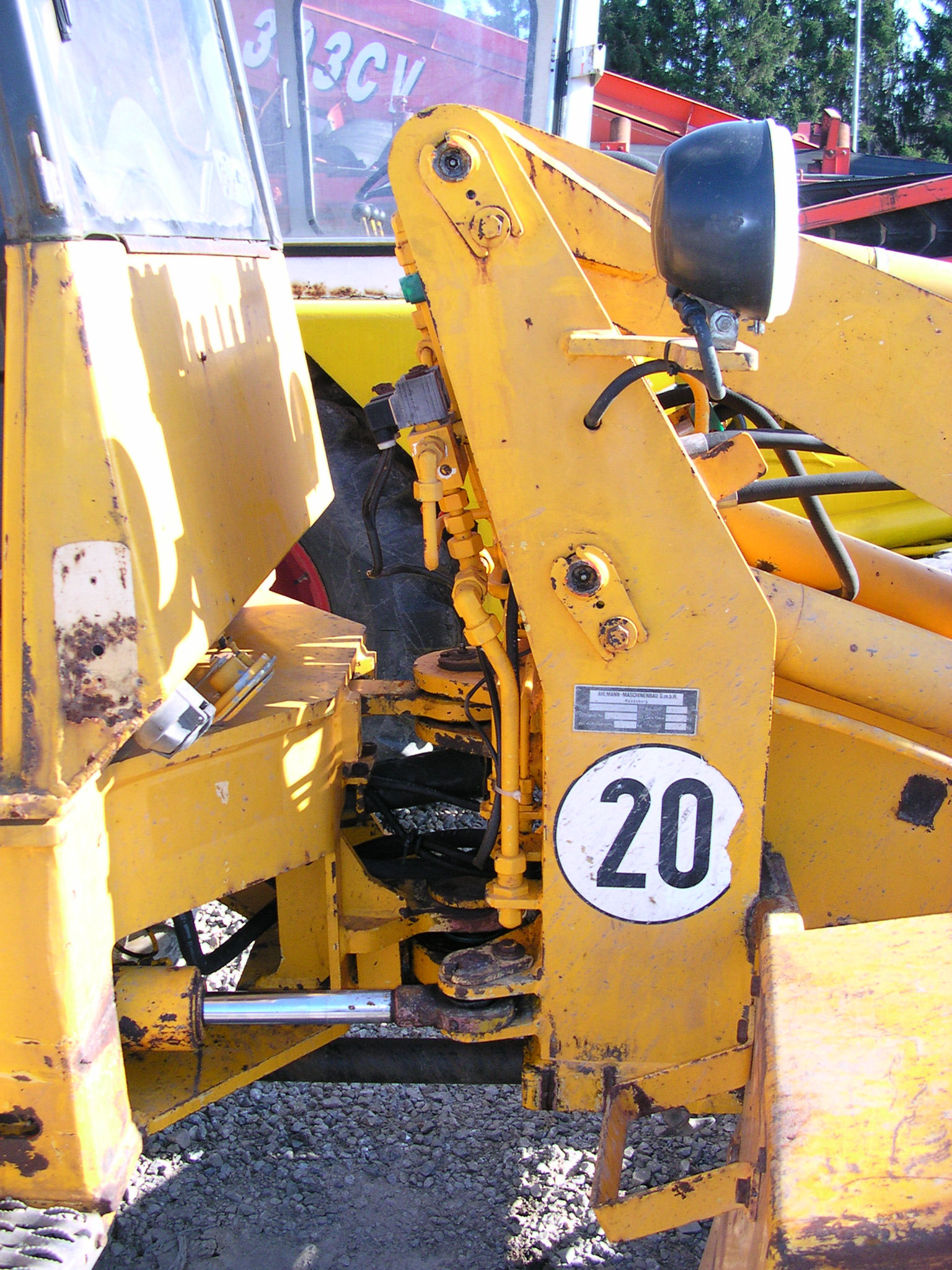 Ahlmann AL7C, Baujahr 1989